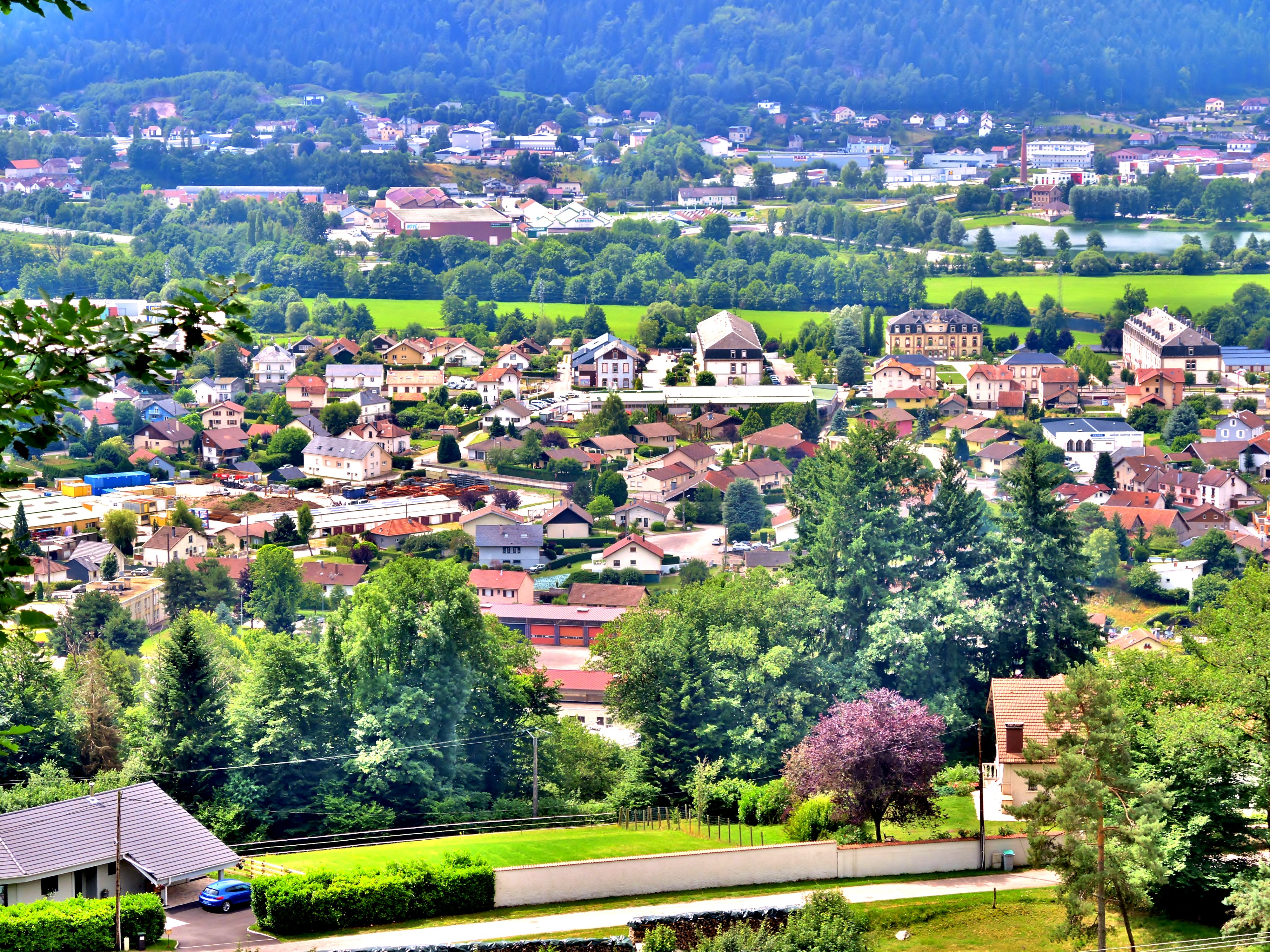 Saint-Etienne-lès-Remiremont, vu du hameau du Pré-des-Gouttes. Vosges